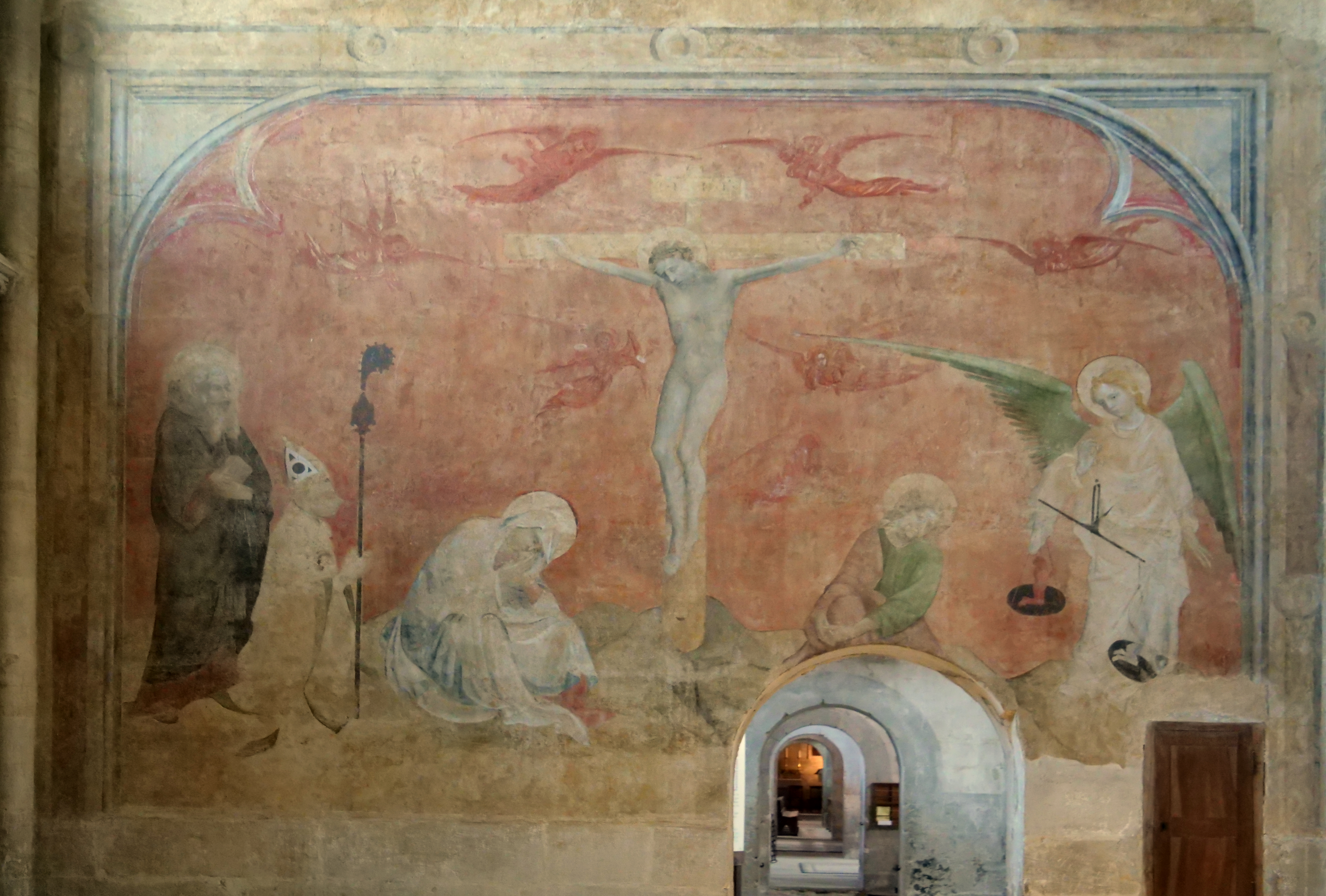 Fresque murale 1, Saint-Antoine l'Abbaye. A gauche, Antoine le Grand, crucifixion avec la Vierge et saint-Jean, à droite, l'archange Michel.